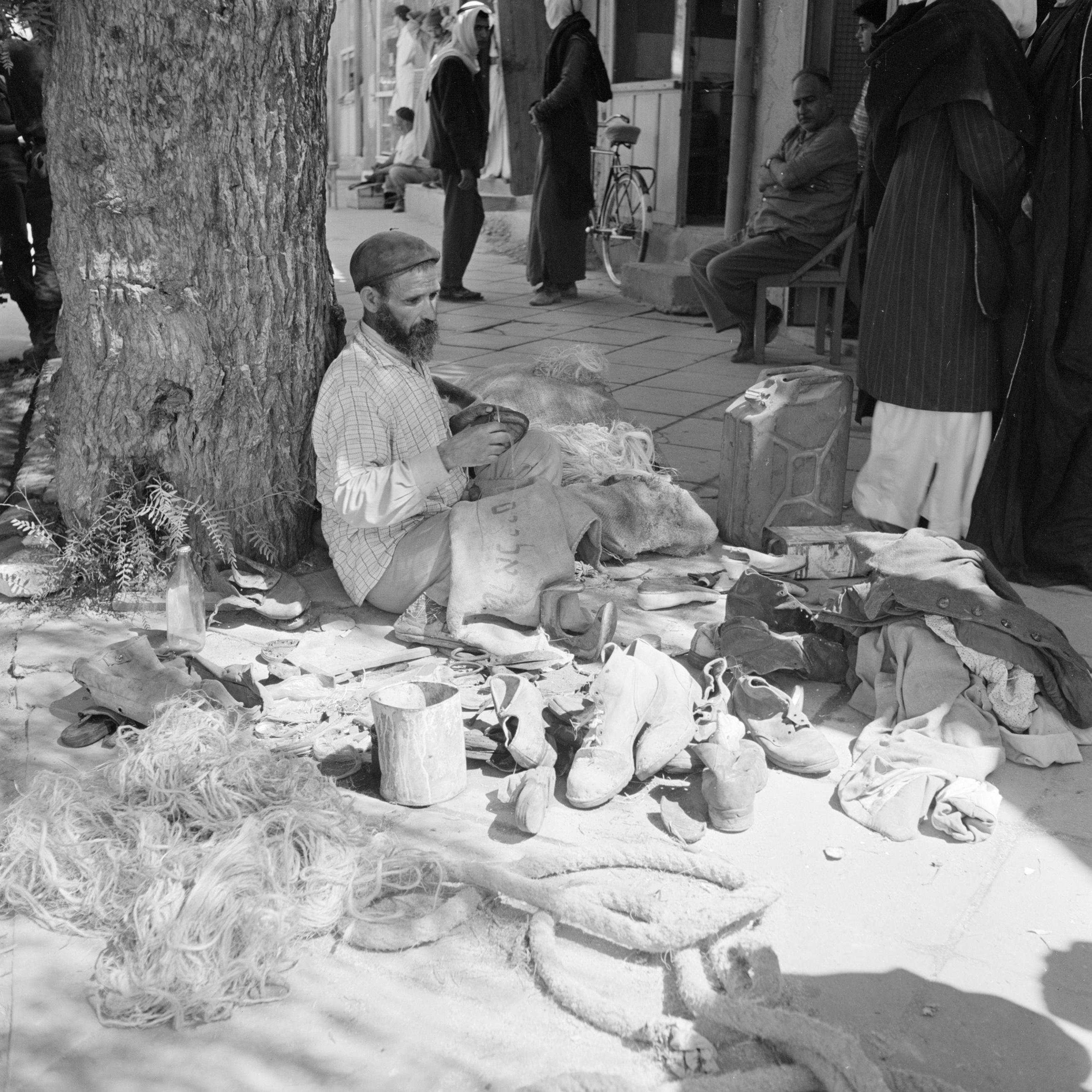 Collectie / Archief : Fotocollectie Van de Poll Reportage / Serie : Israël: Bersjeba Beschrijving : Staathandelaar in allerlei tweedehands goederen Datum : ongedateerd Locatie : Beersheba, Bersjeba, Israël Trefwoorden : handel, straatbeelden Fotograaf : Poll, Willem van de, [onbekend] Auteursrechthebbende : Nationaal Archief Materiaalsoort : Negatief (zwart/wit) Nummer archiefinventaris : bekijk toegang 2.24.14.02 Bestanddeelnummer : 255-3518